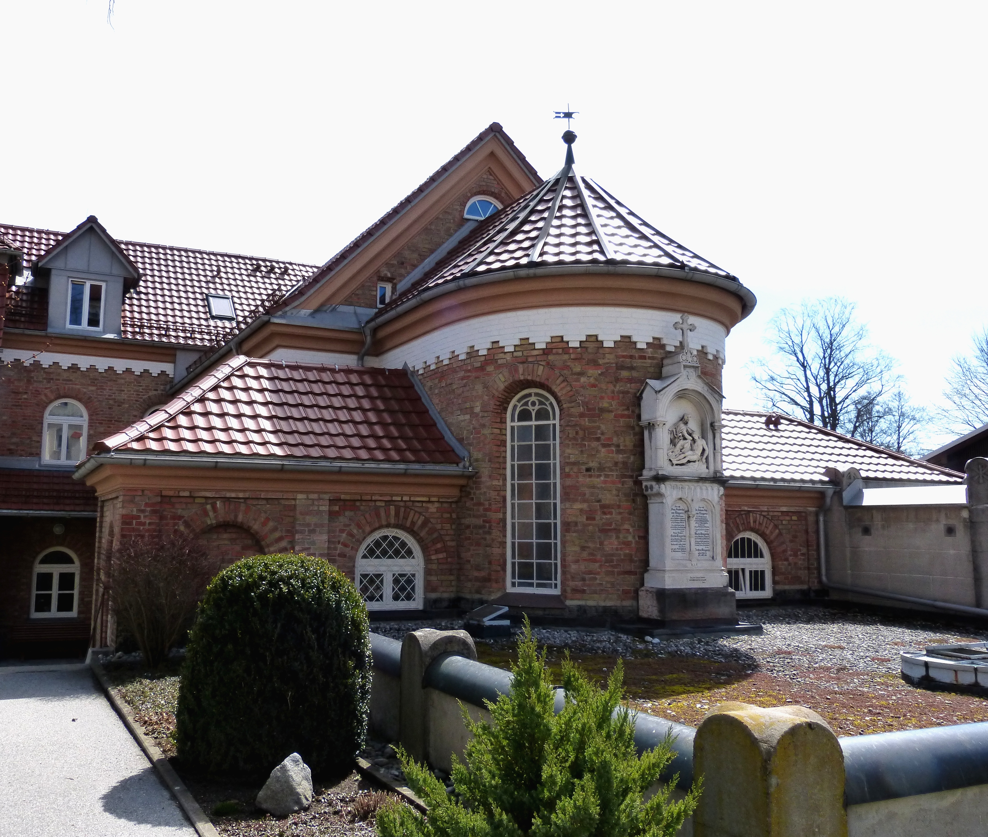 Tutzing, Hauptstraße 13, Kloster der Missionsbenediktinerinnen, Rückseite des Stammhauses mit Kapelle Maria Hilf. This is a photograph of an architectural monument.